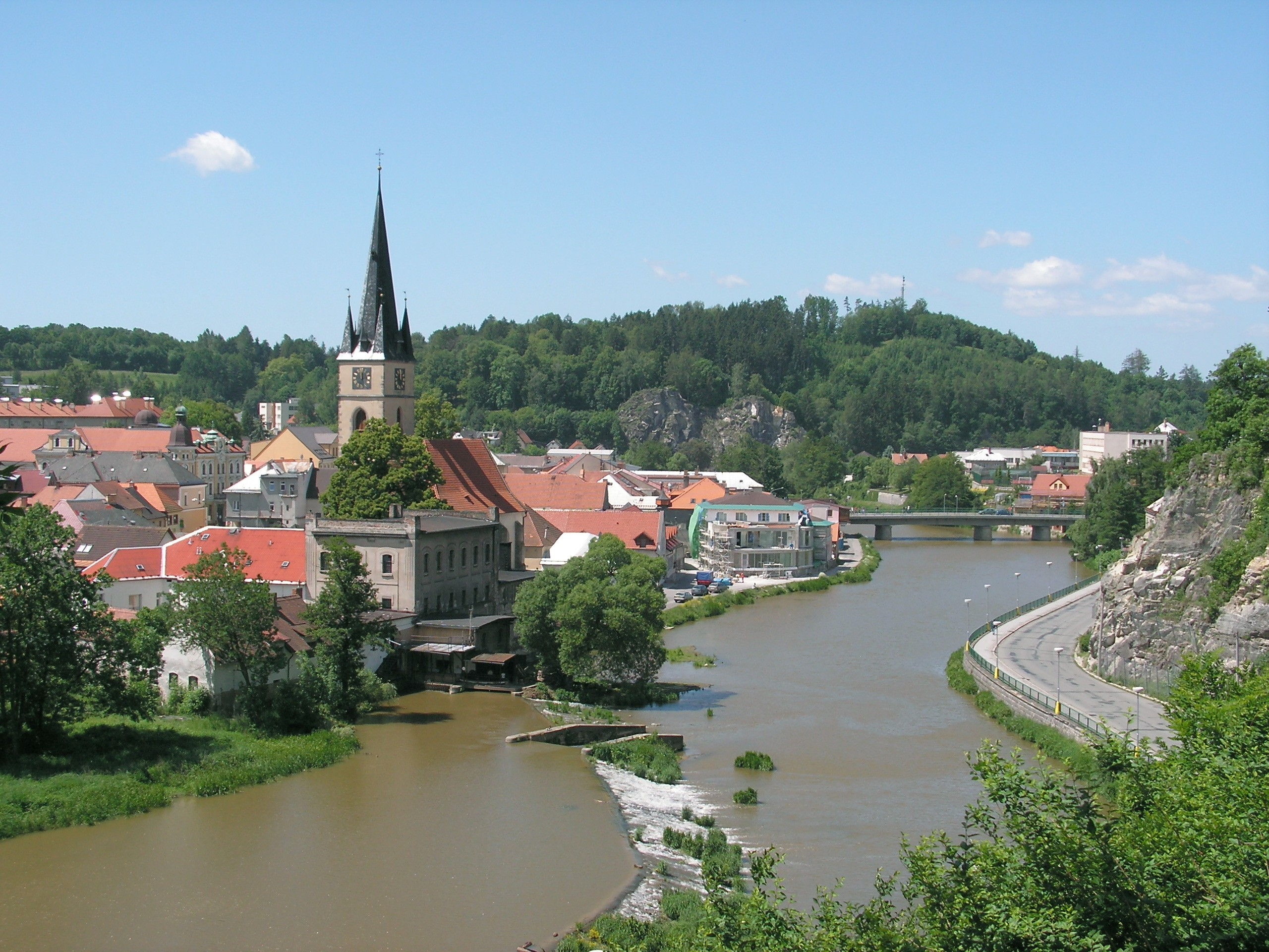 Město Ledeč nad Sázavou. Pohled od železniční zastávky Horní Ledeč.